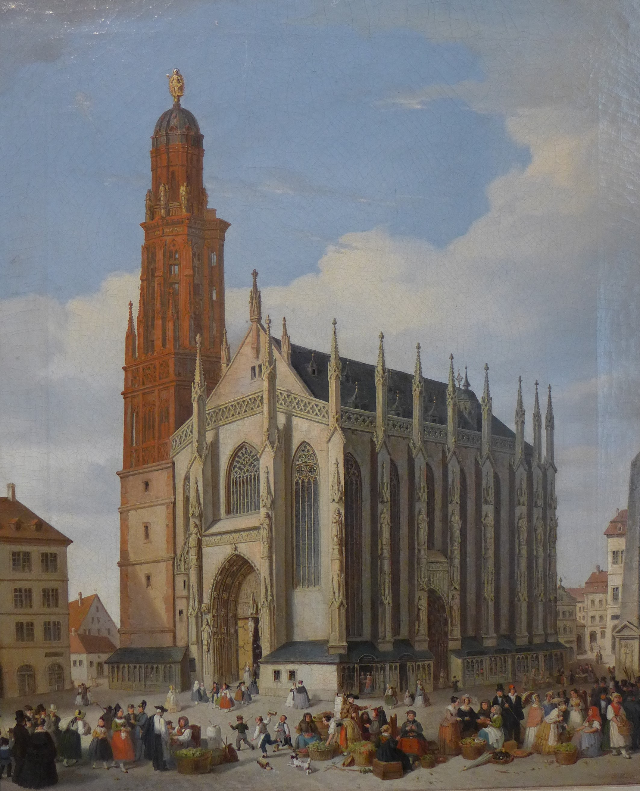 Marienkapelle Würzburg um 1845, Gemälde von Peter Geist (Fürstenbaumuseum Würzburg)